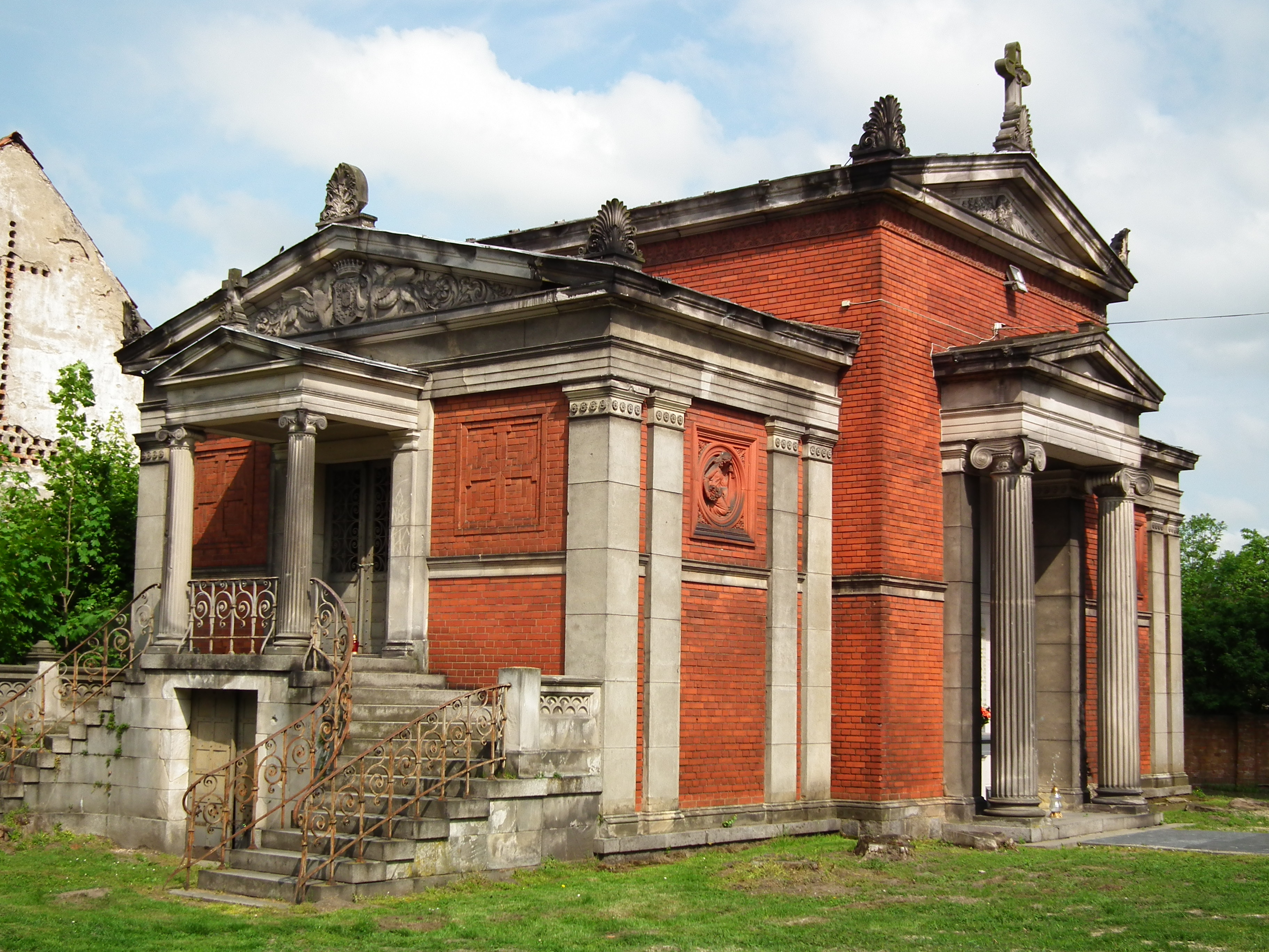 Mauzoleum Schaffgotschów w Kopicach.